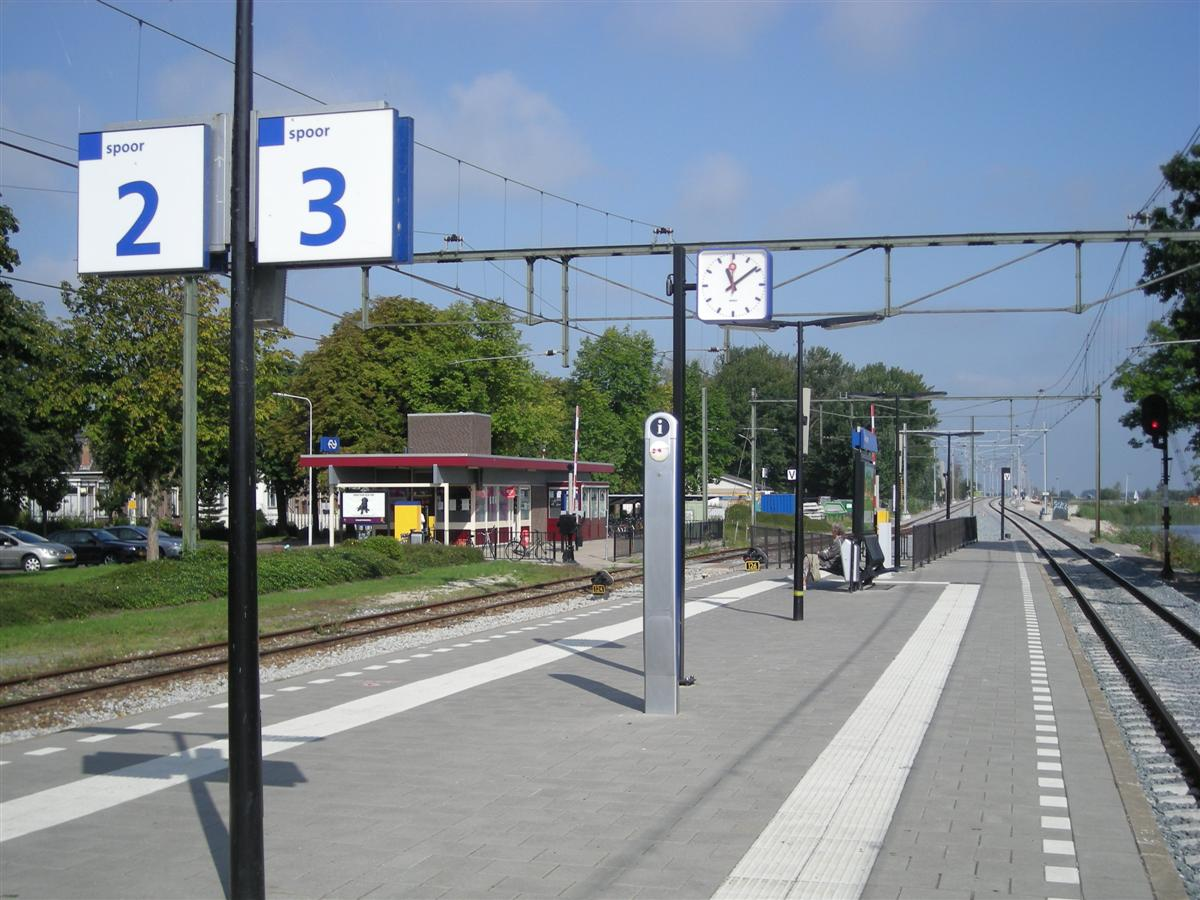 Stasjon Akkrum